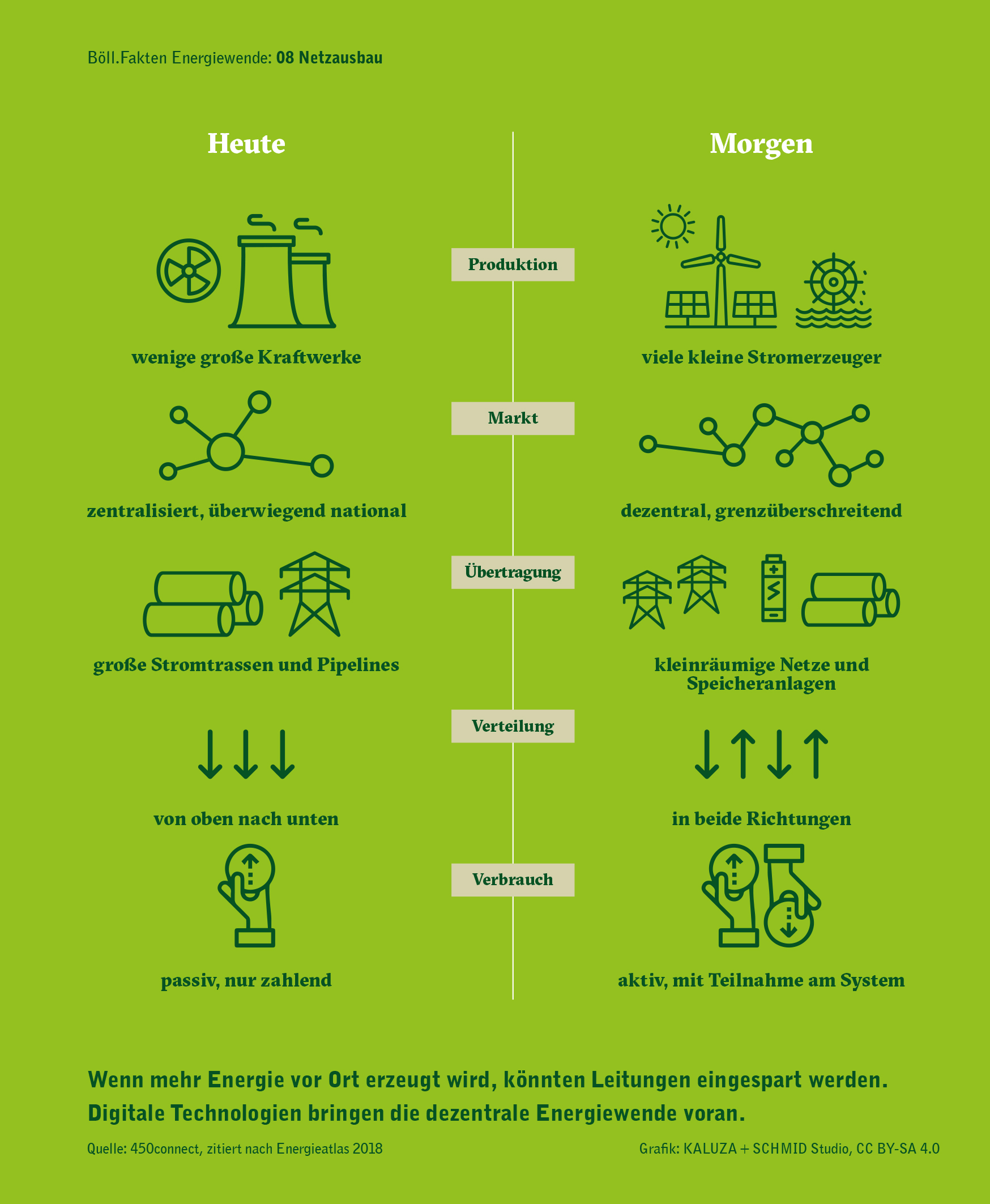 Böll.Fakten: Energiewende: 08 – Netzausbau V4 Web BOeLL-FF Energiewende Teil der Broschüre „Energiewende: Siebzehn Richtigstellungen zur Stromversorgung“ – Fakten und Argumente zur Diskussion um Erneuerbare Energien bzw. die Energiewende in Deutschland (Seite 20 - 21 (PDF-Seite 11)). URL Shortener für diese Seite: PDF: „Dieses Werk steht unter der Creative-Commons-Lizenz CC BY-SA 4.0“ - siehe Seite 43 (PDF-Seite 22)